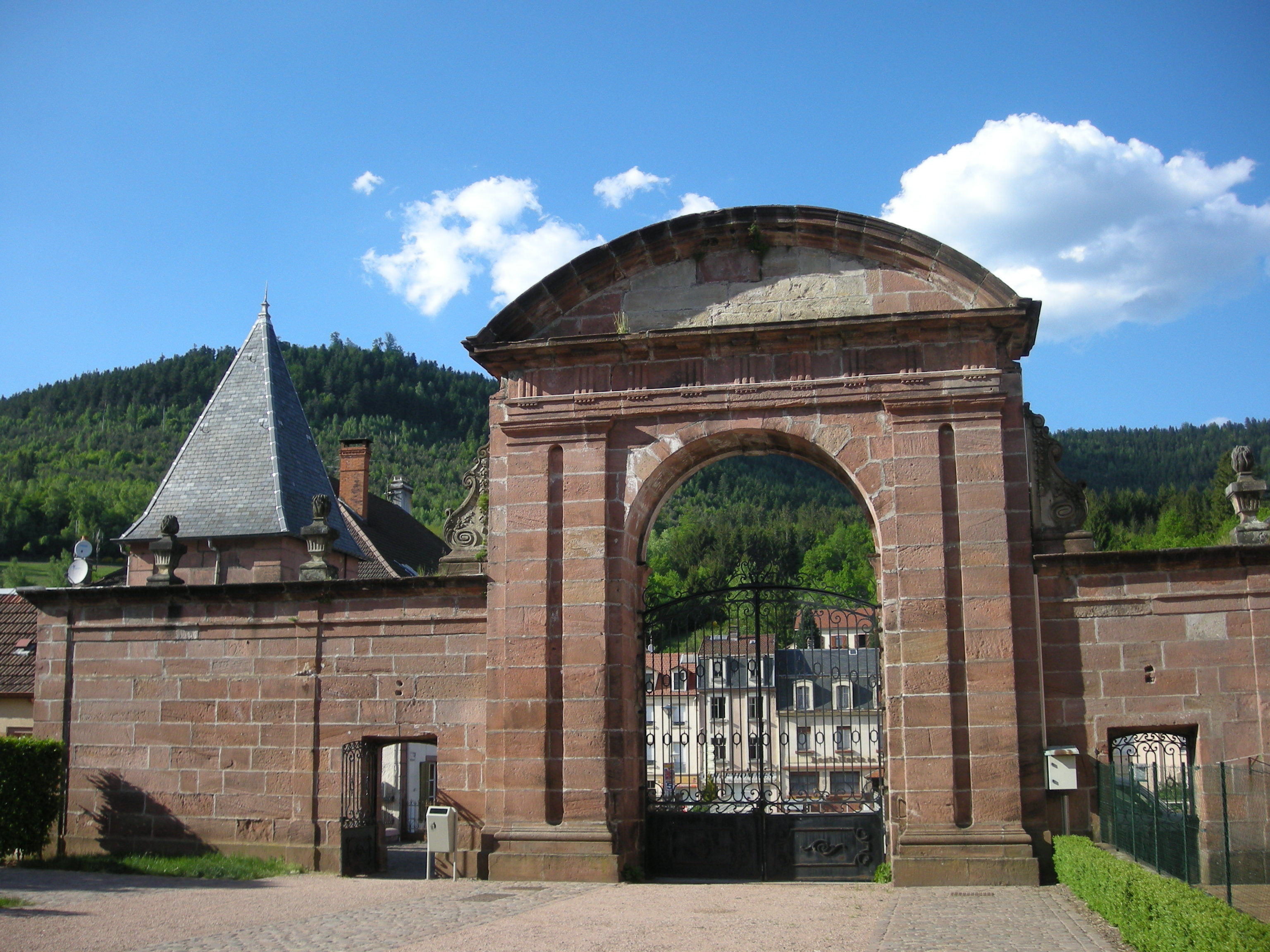 Portail d'entrée (XVIIIe siècle) - côté intérieur - de l'ancienne abbaye de Moyenmoutier (Vosges). Il est entouré de volutes en pierre blanche et surmonté d'un vaste fronton semi-circulaire, dont le linteau présente des motifs doriques repris sur l'ancienne porte d'entrée de l'église actuellement murée. A gauche, une tour d'angle.